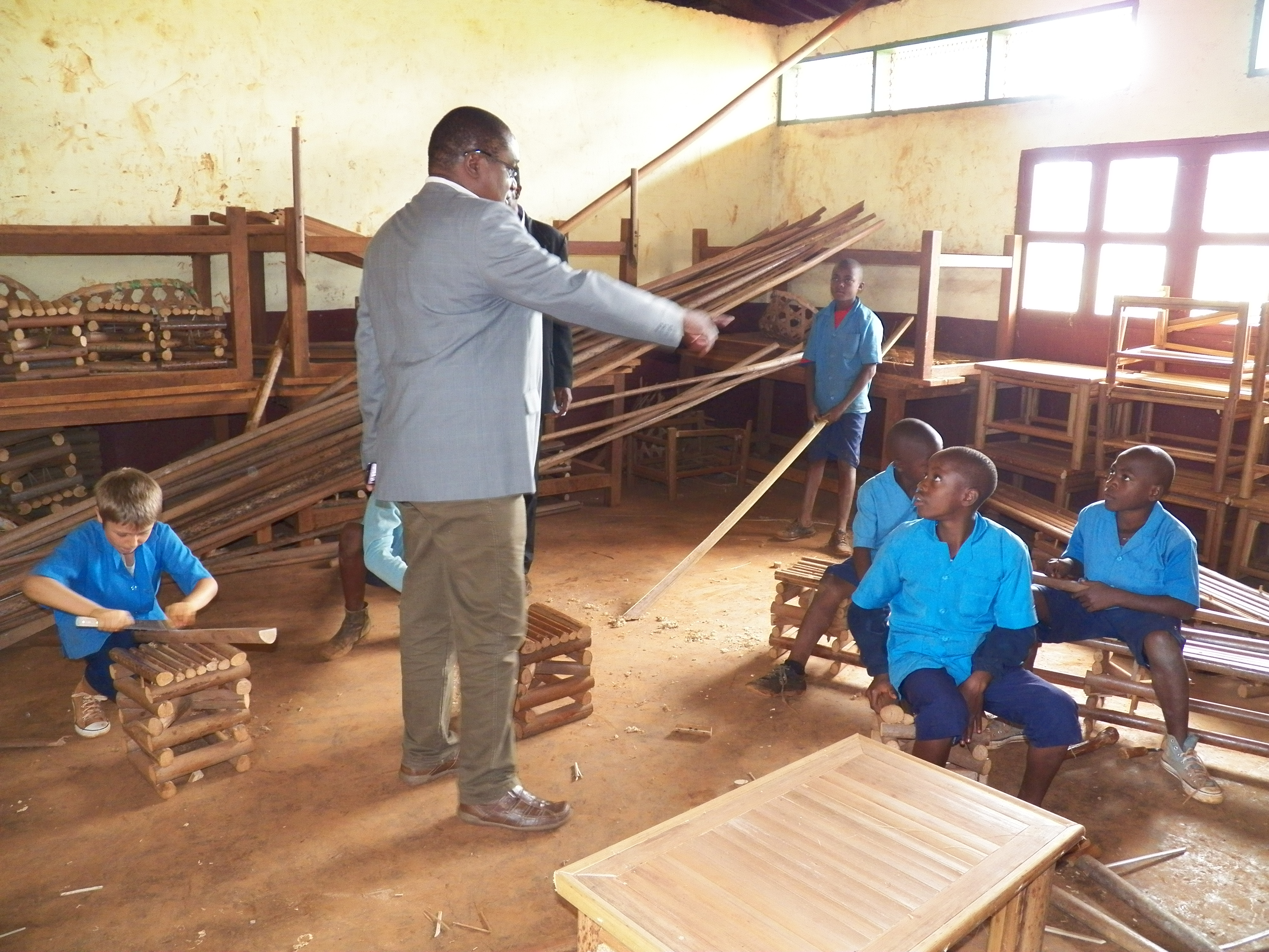 Ils sont bien attentifs